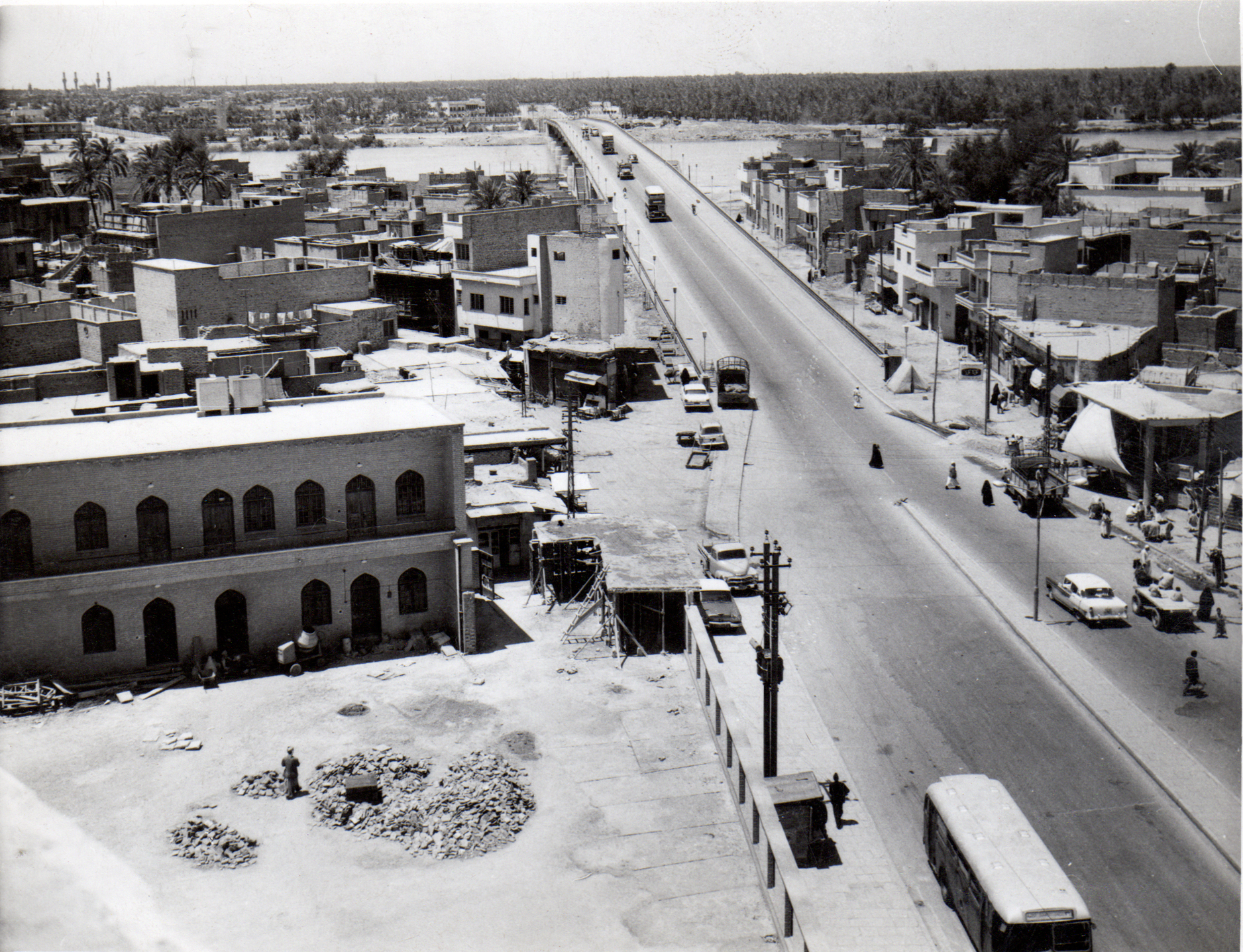 جسر الائمة في الاعظمية عام 1960، والتقطت الصورة من فوق برج ساعة جامع الامام الاعظم ابي حنيفة